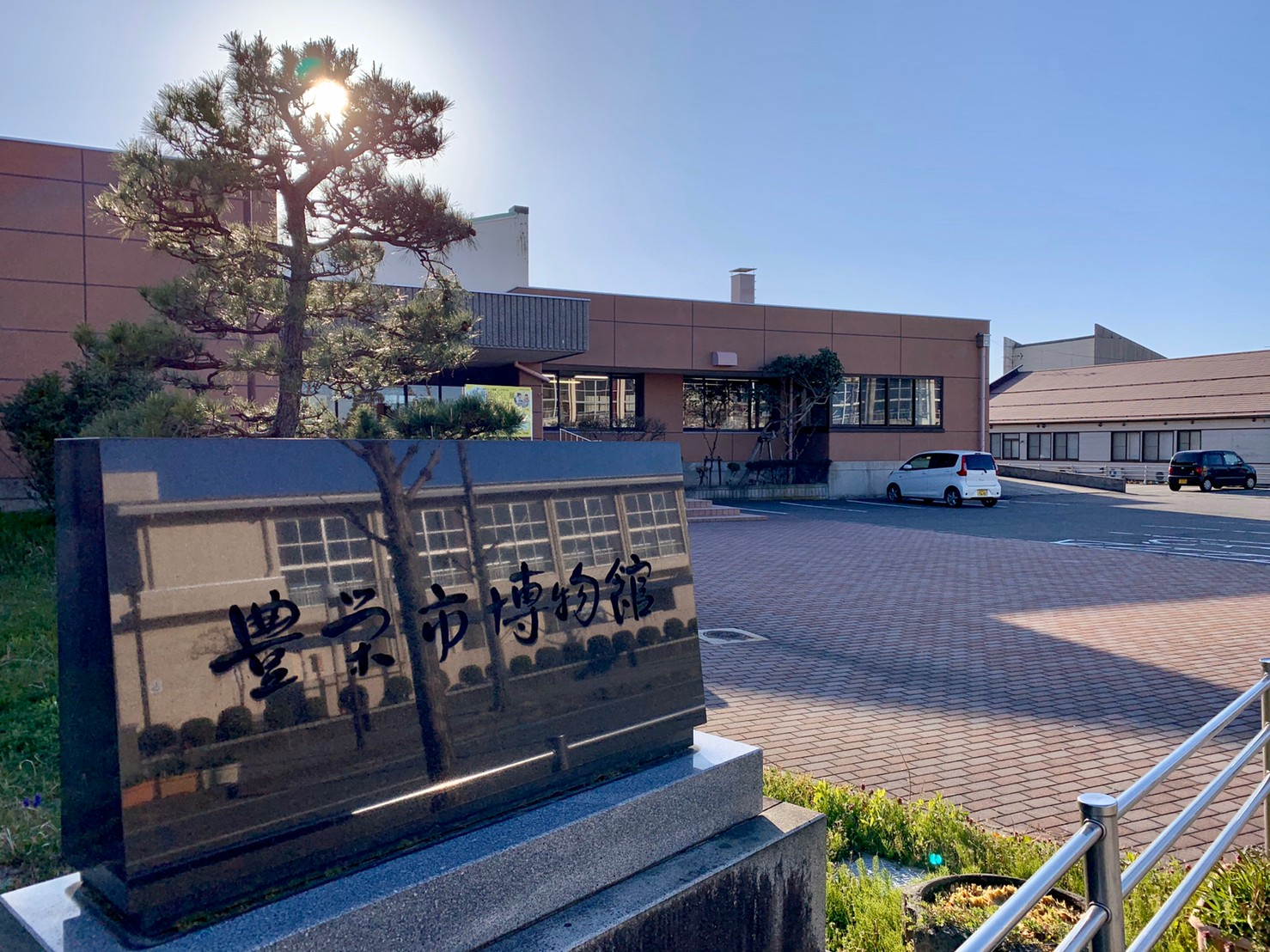 新潟市北区郷土博物館（2020年4月）